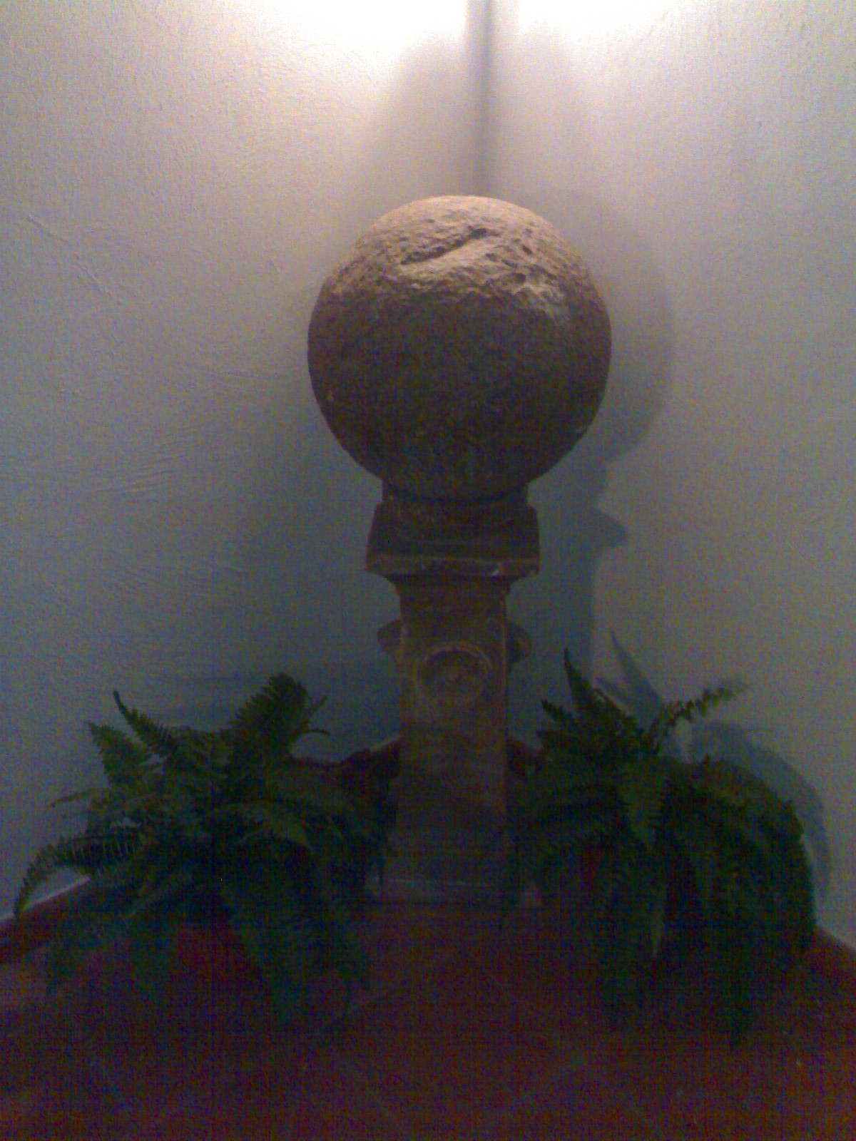 Palla di bombarda scansata dal crocifisso miracoloso. Chiesa di Santa Maria del Carmine Maggiore, Napoli